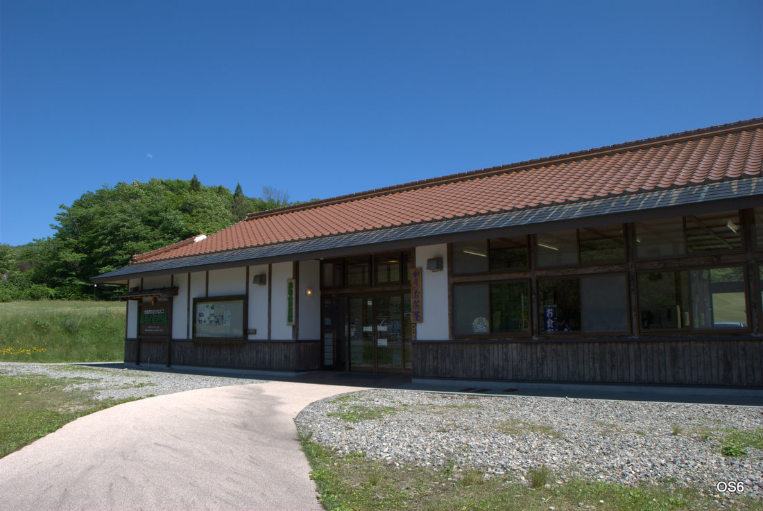 広島県北広島町の芸北高原の自然館